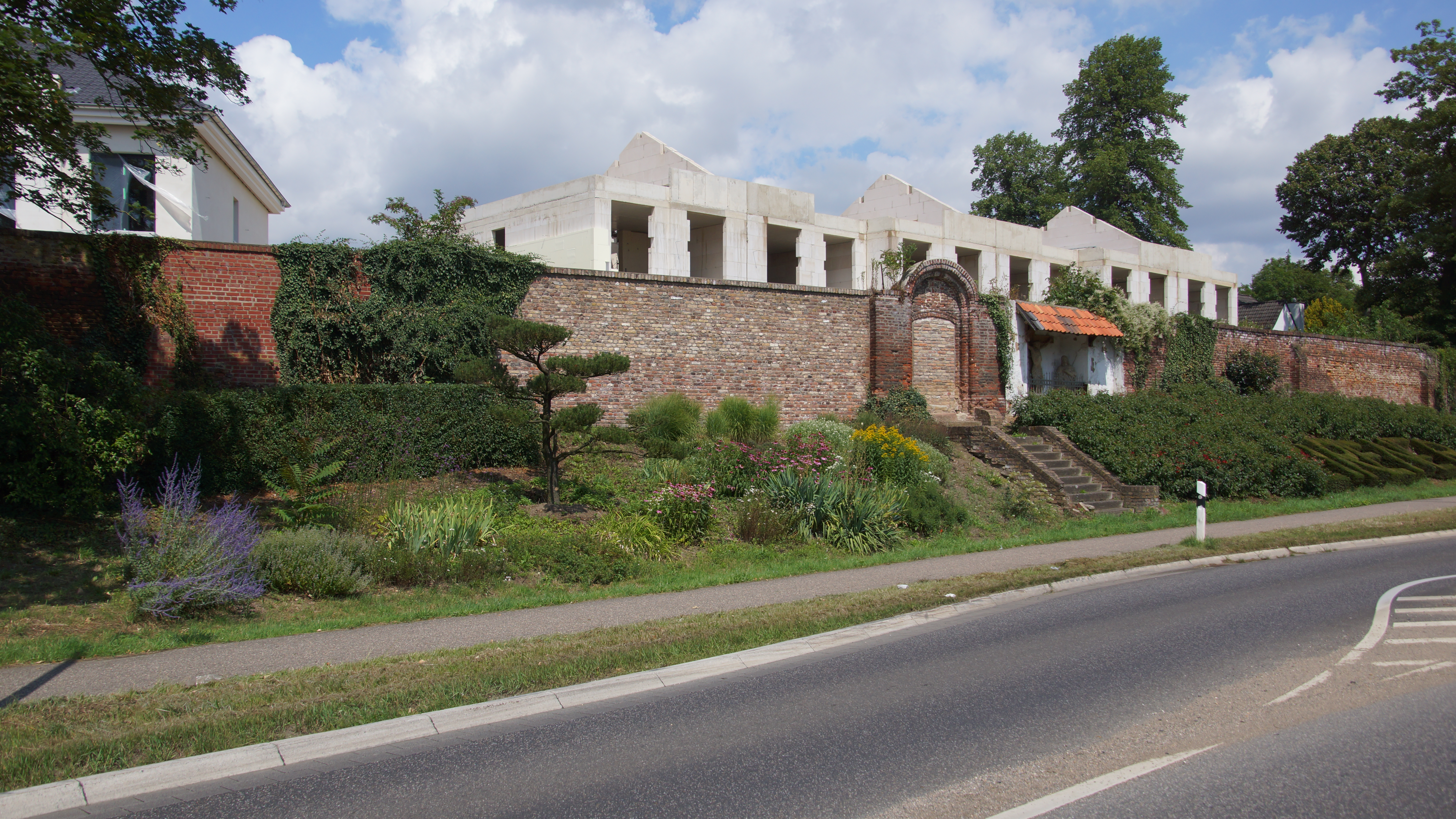 Immunitätsmauer des ehemaligen Klosters Königsdorf in Frechen-Königsdorf, Sebastianusstr./Aachener Str. This is a photograph of an architectural monument. 13